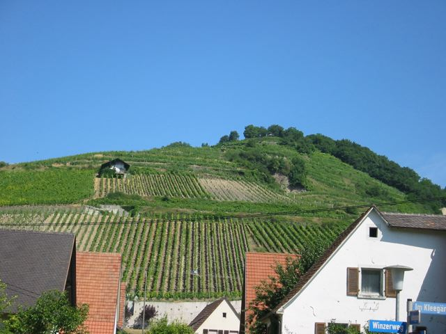 Schlossberg von Achkarren, vom Tal aus gesehen, Deutschland, Baden-Württemberg